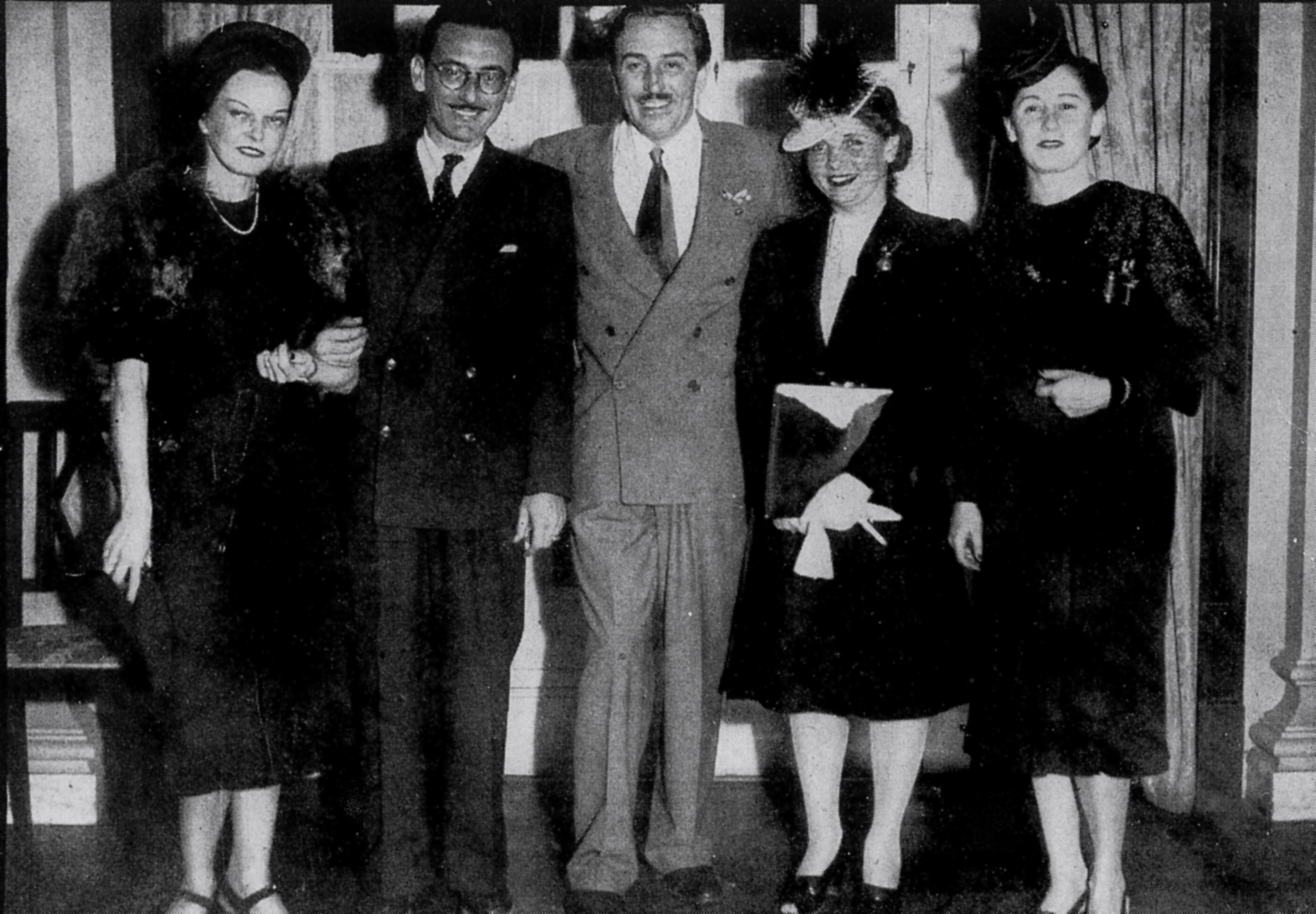 O compositor brasileiro Ari Barroso com o produtor estadunidense Walt Disney e sua esposa, quando da visita deste ao Brasil para a criação da personagem "Zé Carioca".